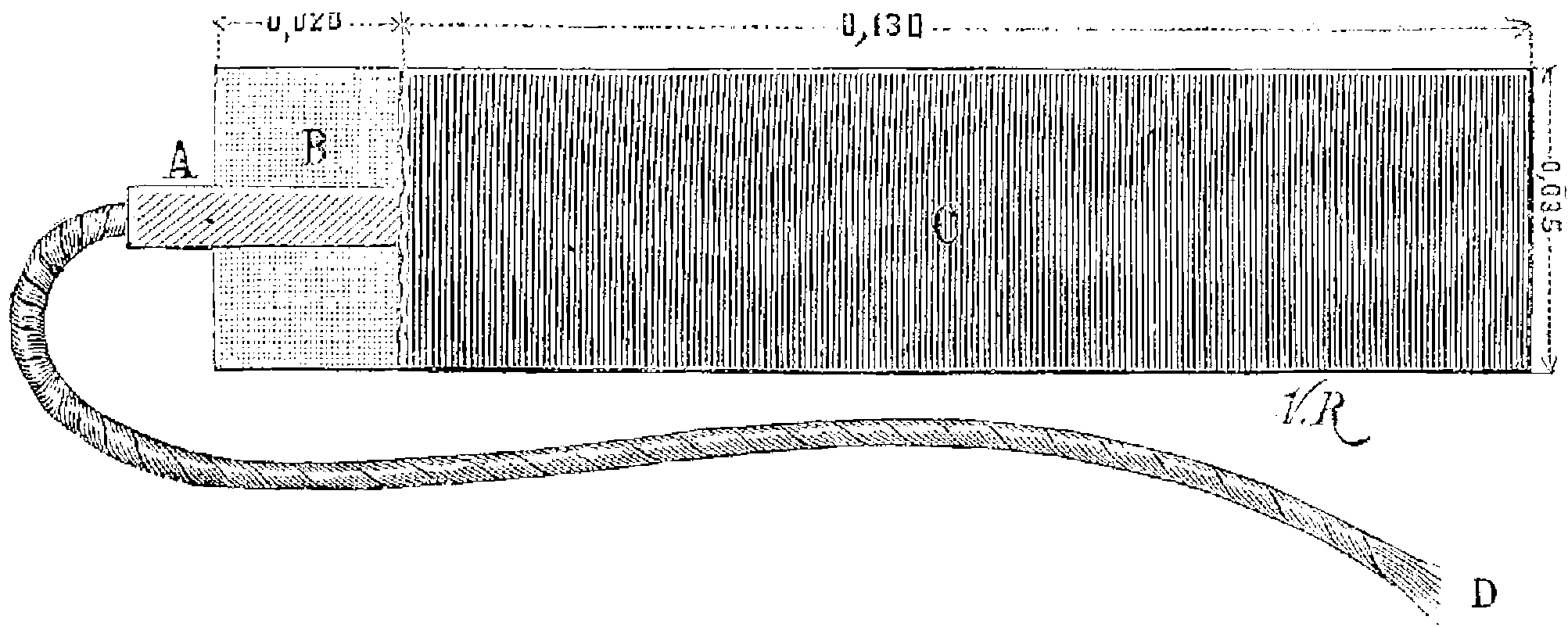 Coupe d’un pétard de dynamite, avec son amorce, confectionné, pour les usages militaires, à la poudrerie de Vonges (Côte-d’Or)